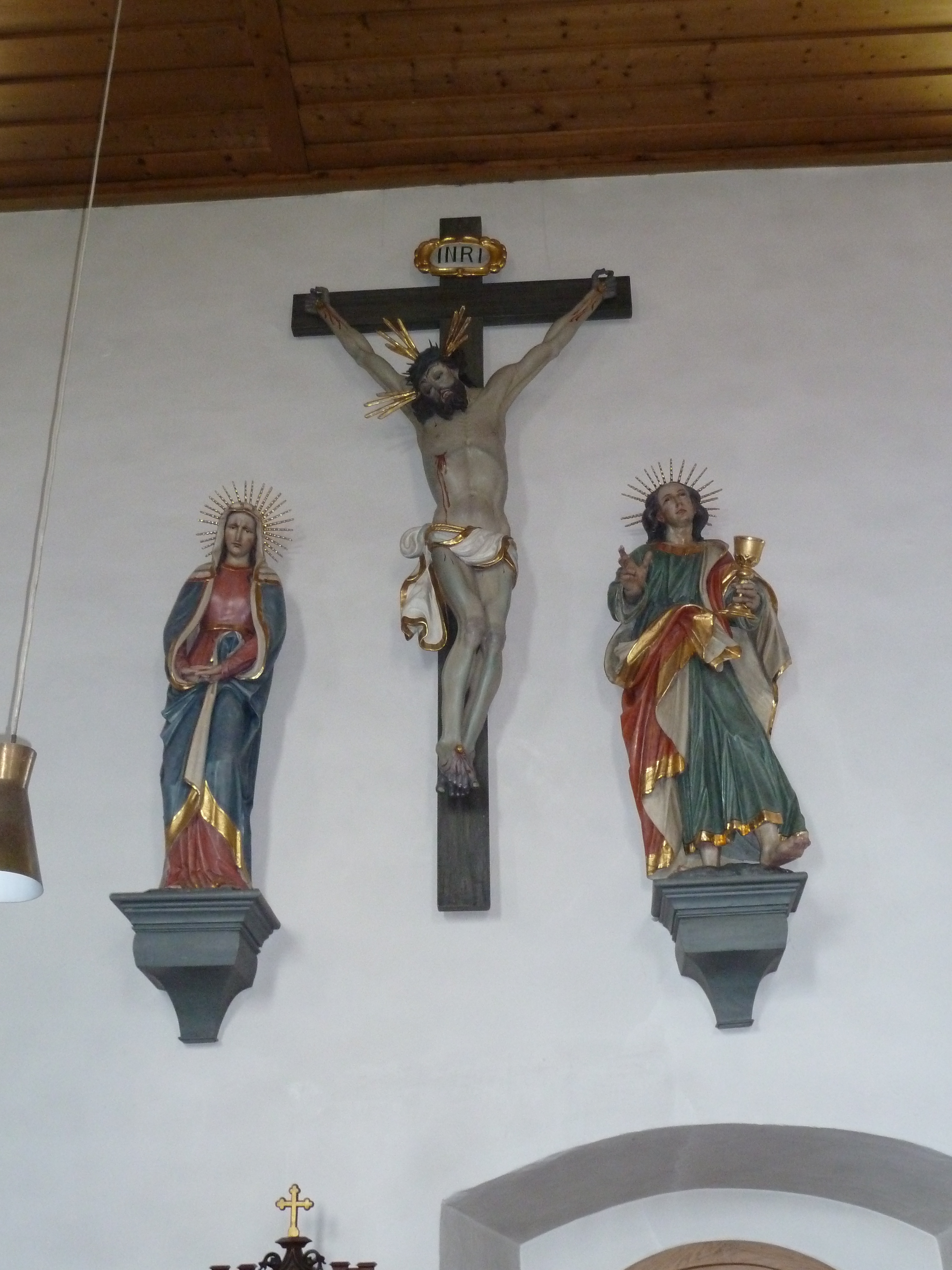 Kreuzigungsgruppe in der St.-Gallus-Kirche in Lenzkirch-Kappel, geschaffen von den Gebrüdern Johann Schupp und Anton Schupp im 17. Jahrhundert